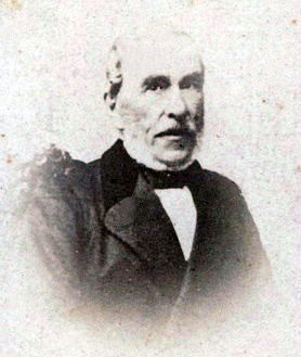 Juan Manuel Jarpa Caamaño (Chillán Viejo, Región del Biobío, Chile, 31 de enero de 1804-Santiago, Región Metropolitana de Santiago, Chile, 2 de diciembre de 1876), fue un militar chileno que tuvo el grado de General de División y fue el General más antiguo de Ejército desde el 8 de agosto de 1871 al 31 de diciembre de 1875.